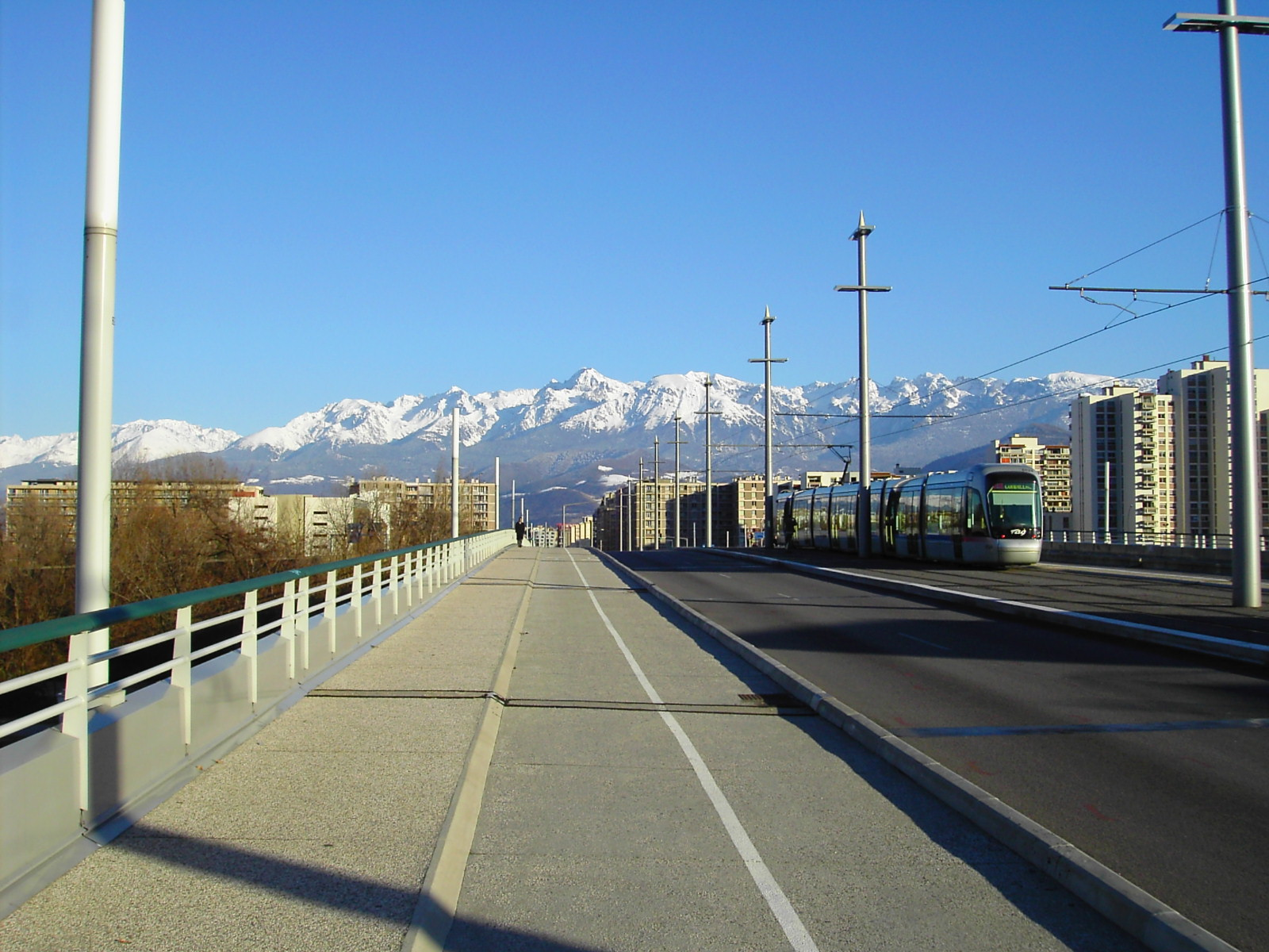 Pont de Catane sur le Drac entre Grenoble et Seyssinet